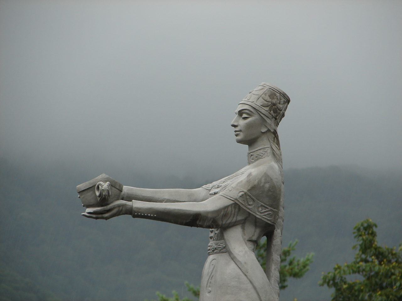 Скульптура Горянка: развилка улиц Ленина и Мира, Карачаевск, Карачаево-Черкесия